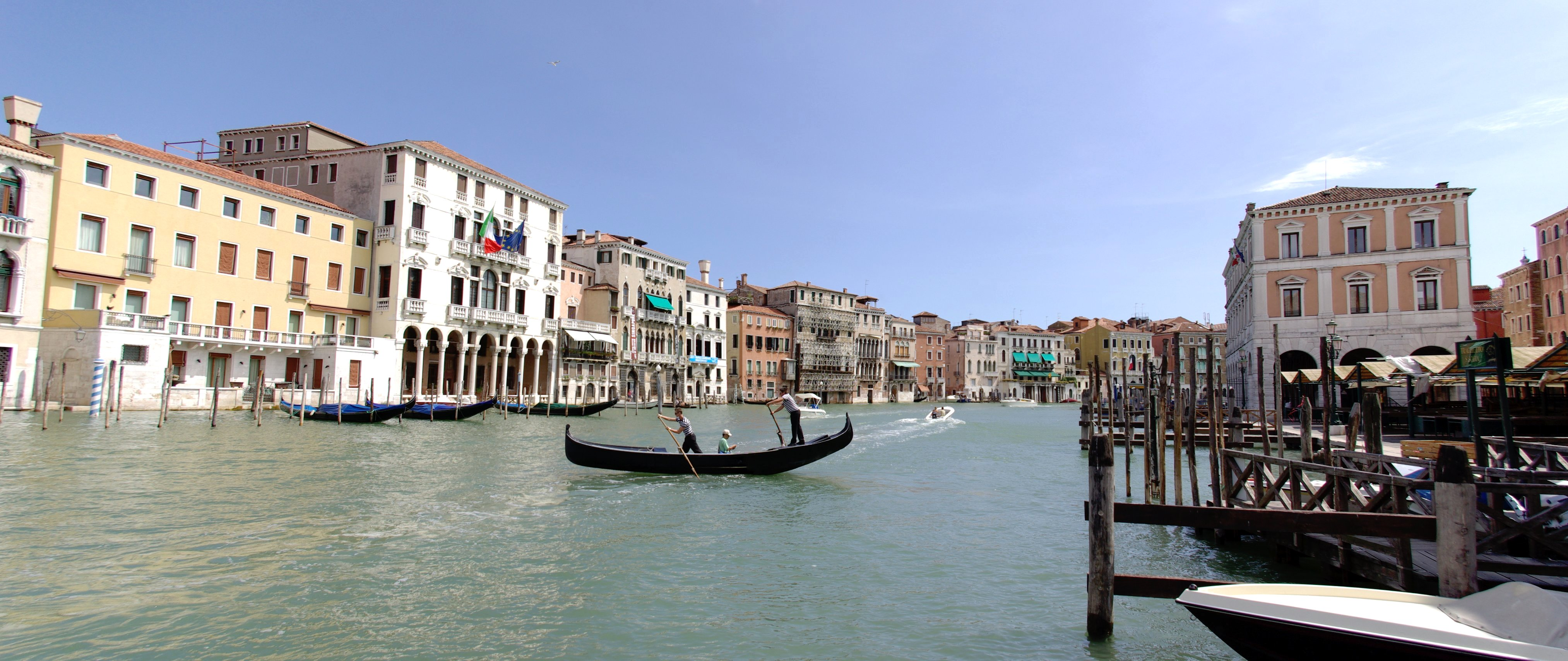 Venedig: Blick von der Pescaria di Rialto auf den Canal Grande nach Südosten, links der Palazzo Michiel dalle Colonne, rechts die Fabbriche Nuove di Rialto